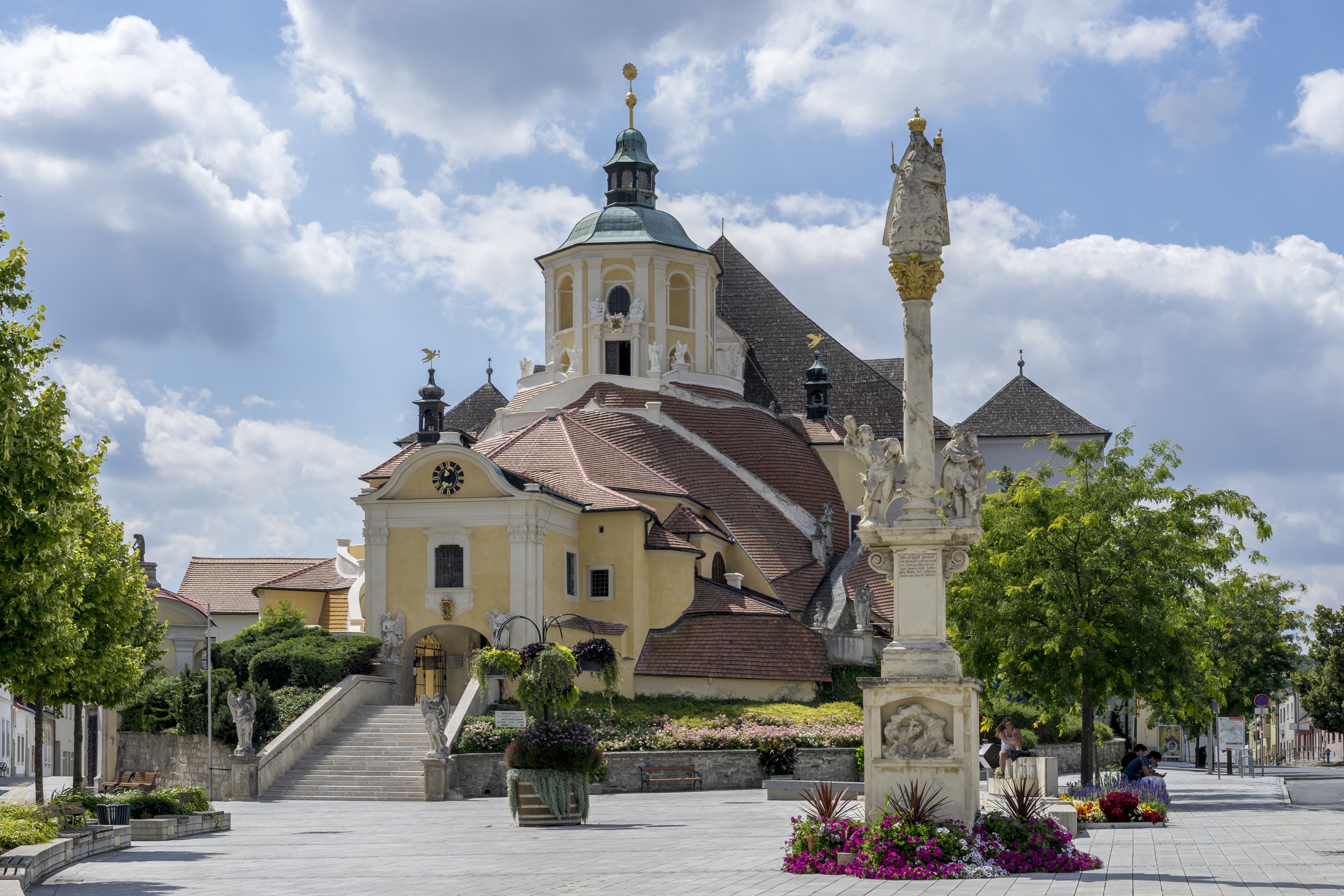 Haydnkirche, Eisenstadt Ansicht 1. Derzeit in Sanierung. Die Marienstatue verdeckt ein Baugerüst. Diverse Statuen fehlen.